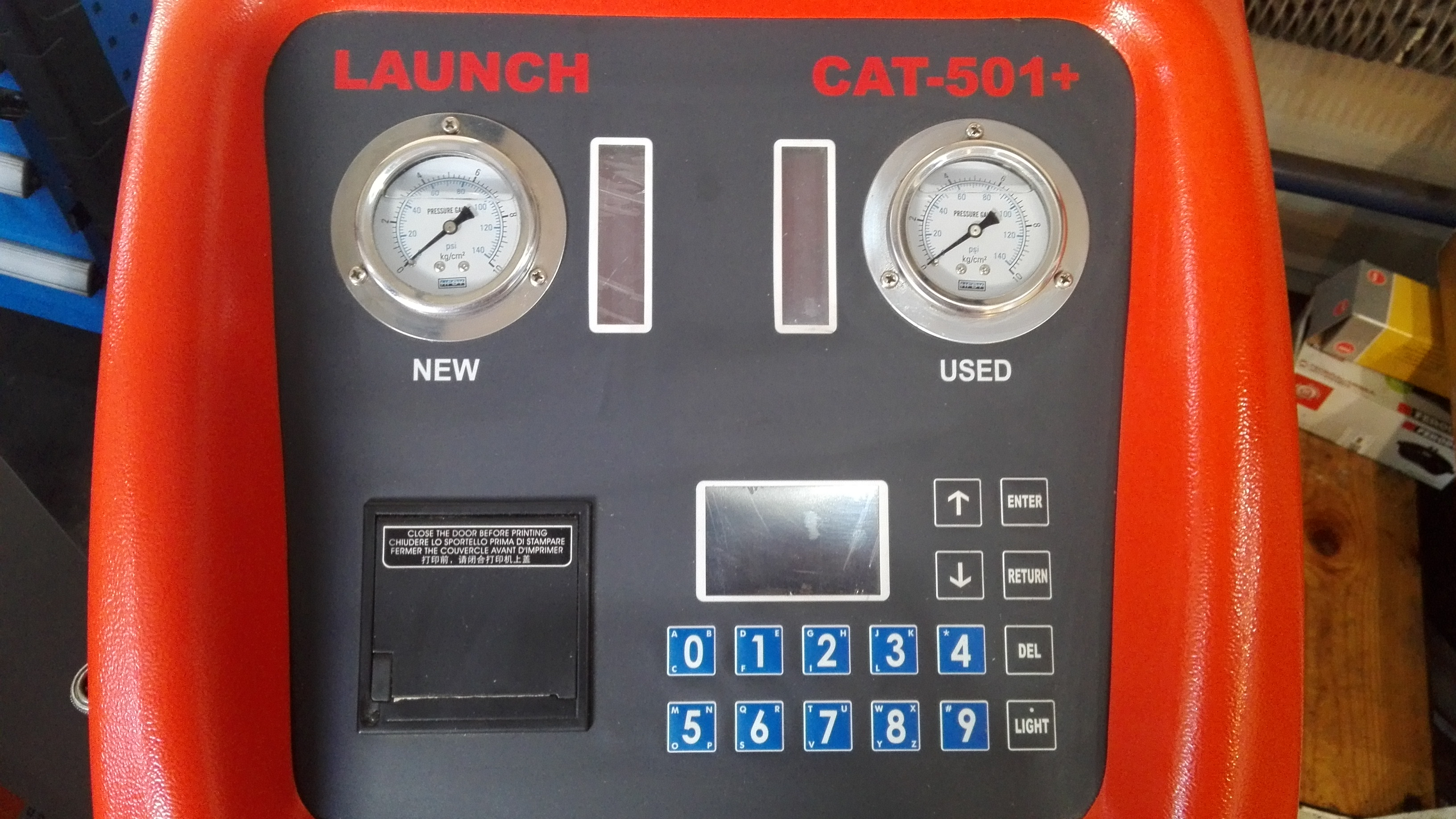 Manometry pokazujące ciśnienie robocze skrzyni oraz maszyny